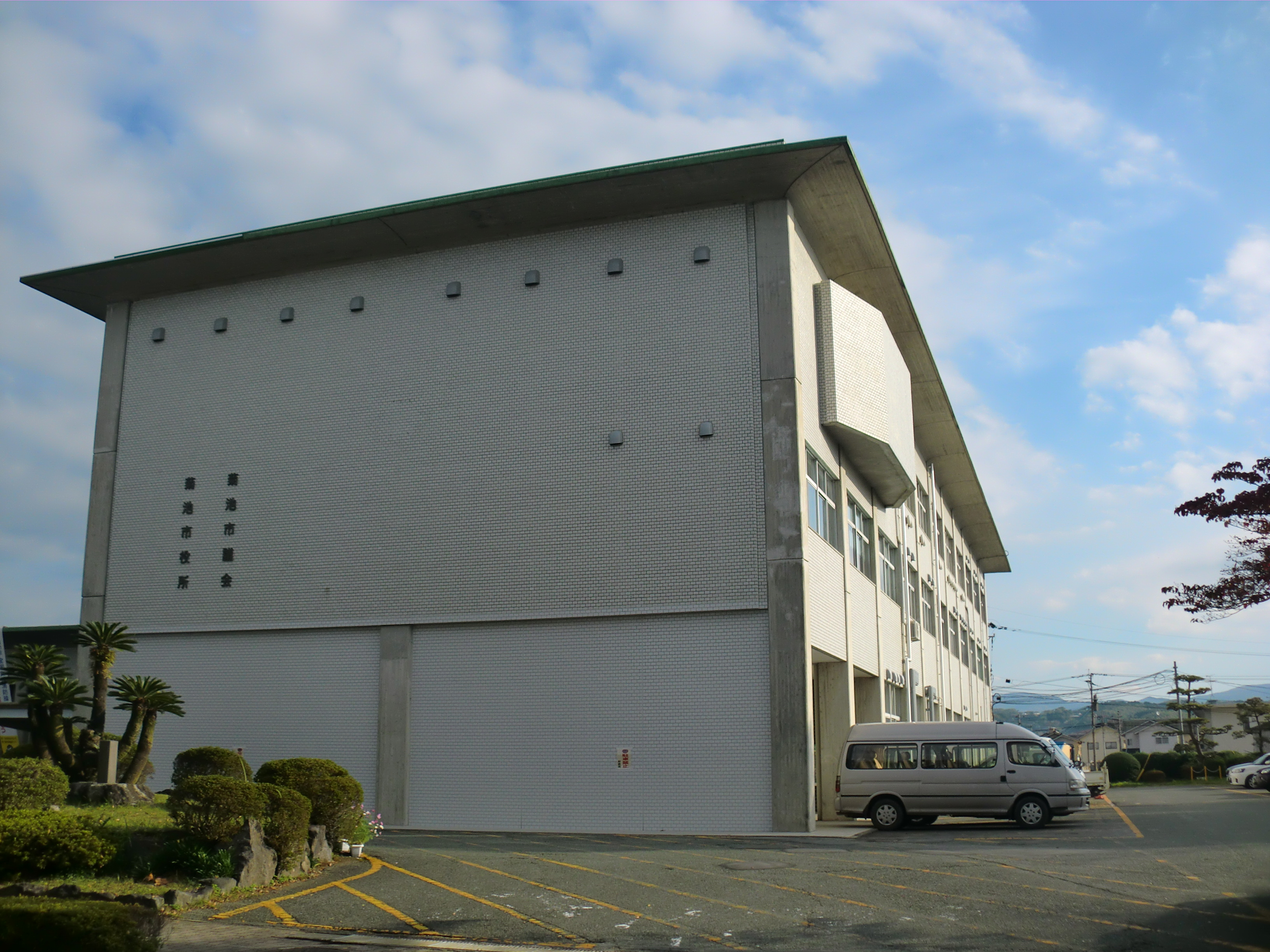 熊本県菊池市にある菊池市役所